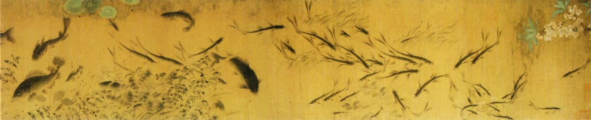 Poissons nageant parmi les fleurs tombées (détail 2) Rouleau portatif, encre et couleurs sur soie, datée 1075.